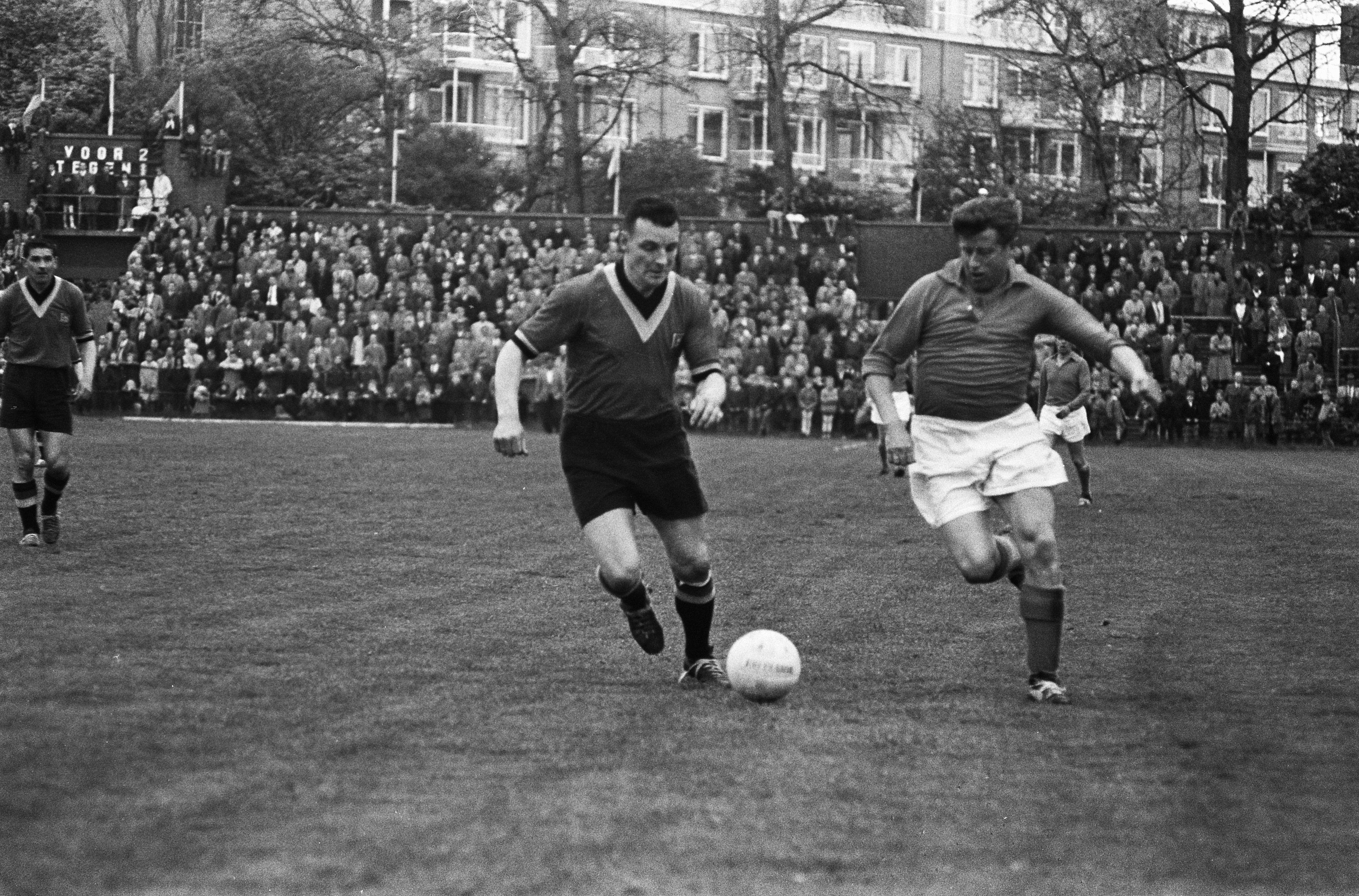 Match de football international vétérans Pays-Bas - Belgique à La Haye. Theo Timmermans (à droite) à la lutte avec l'arrière droit belge Léon Aernaudts. Photographie par Eric Koch / Anefo.